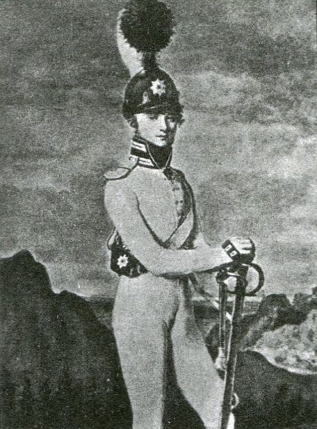 Rodolphe de Maistre, militaire russe d'origine savoisienne, combattant de la guerre de 1812. Uniforme d'officier des chevalier-garde.